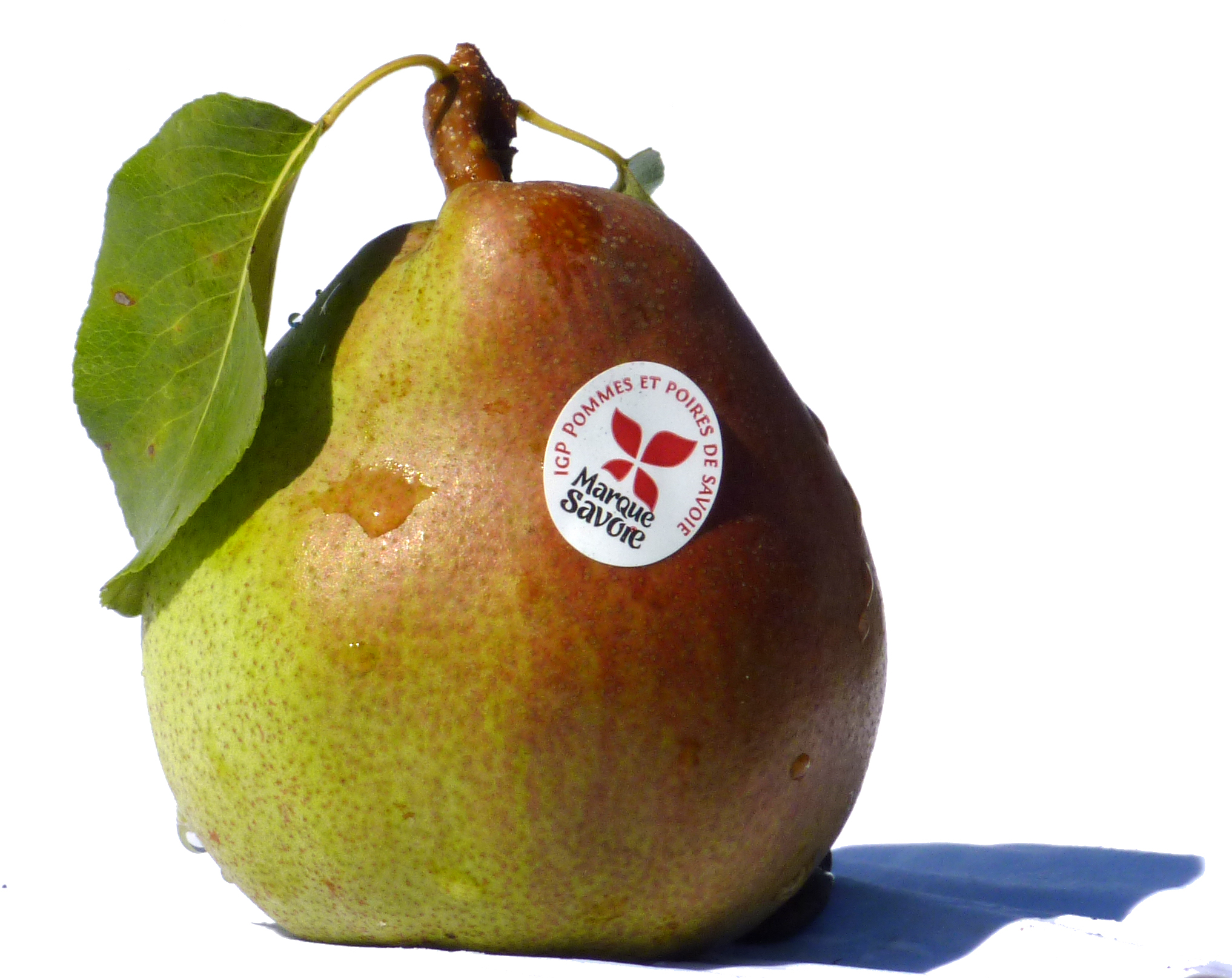 Poire Comice IGP Savoie - Producteur Thomas LE PRINCE